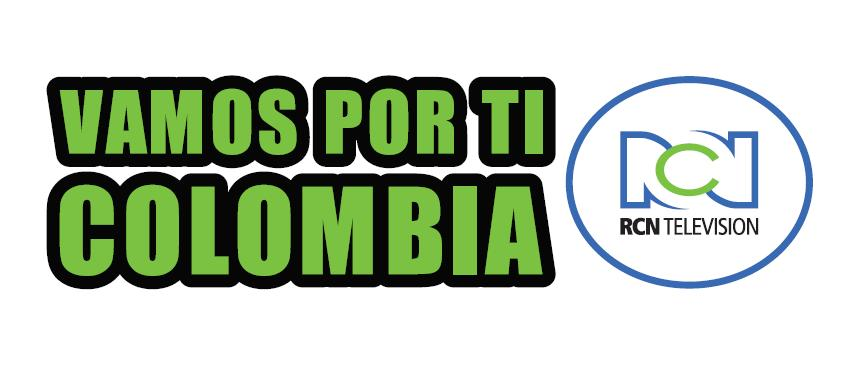 logotipo genérico de Vamos por ti Colombia